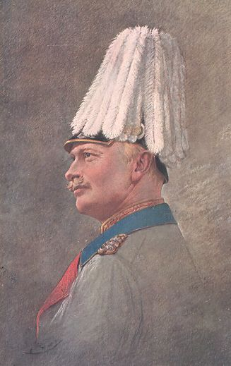 PKönig Friedrich August III. um 1910